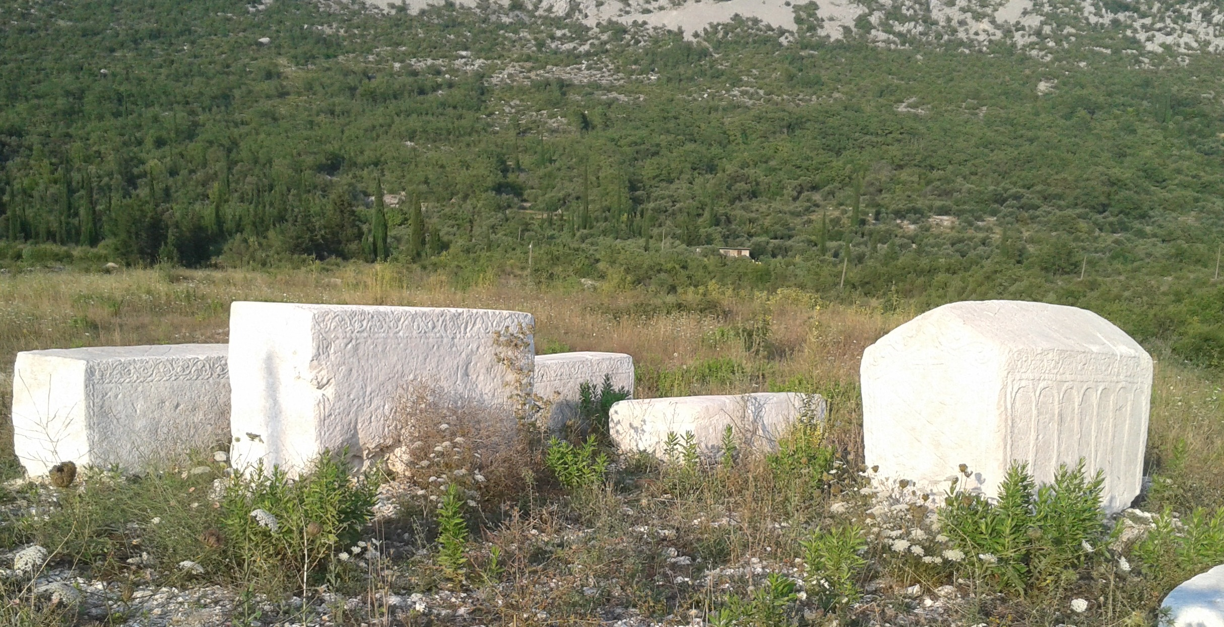 Stećci u Čepikućama